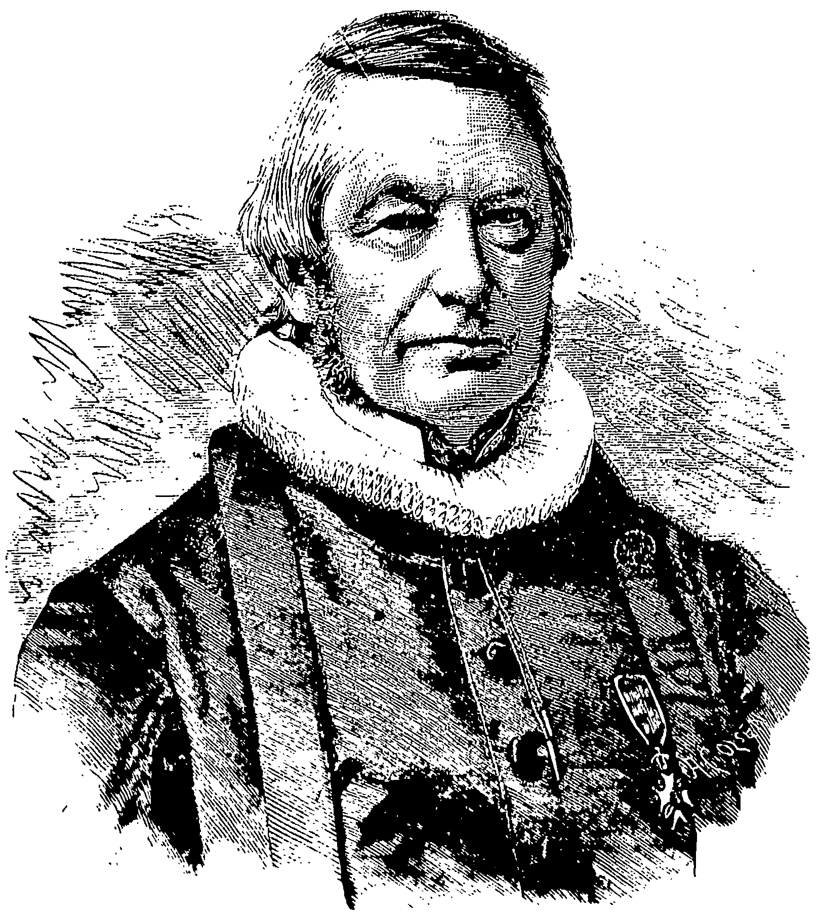 Biskop i Kristiansand stift Jørgen Johan Tandberg.